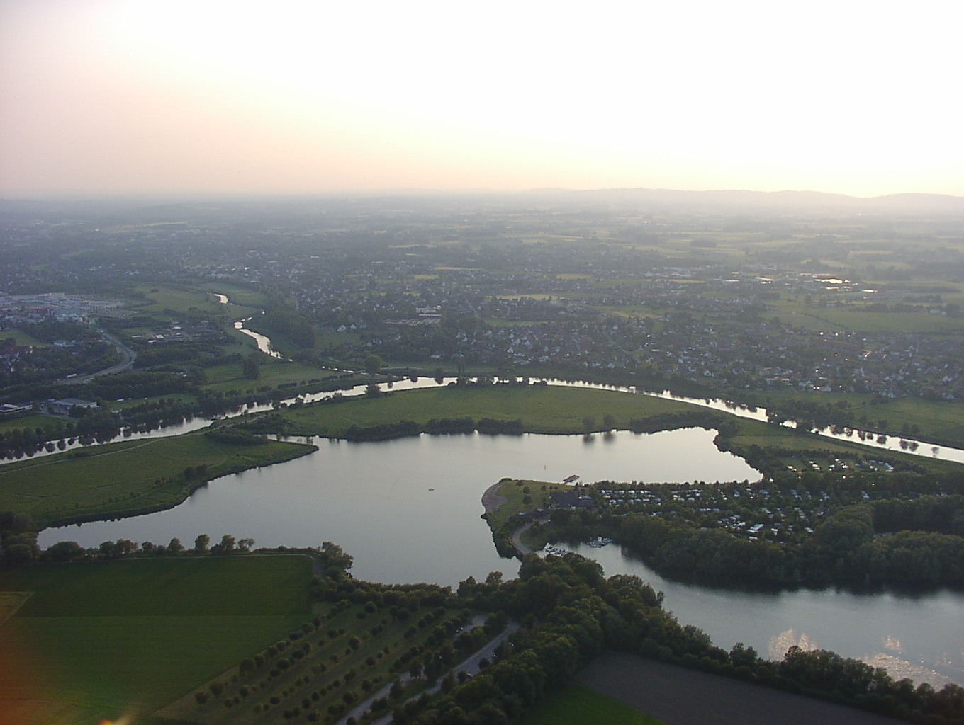 Der Große Weserbogen Sonstiges: ...